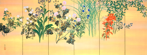 『四季草花図屏風』六曲一双